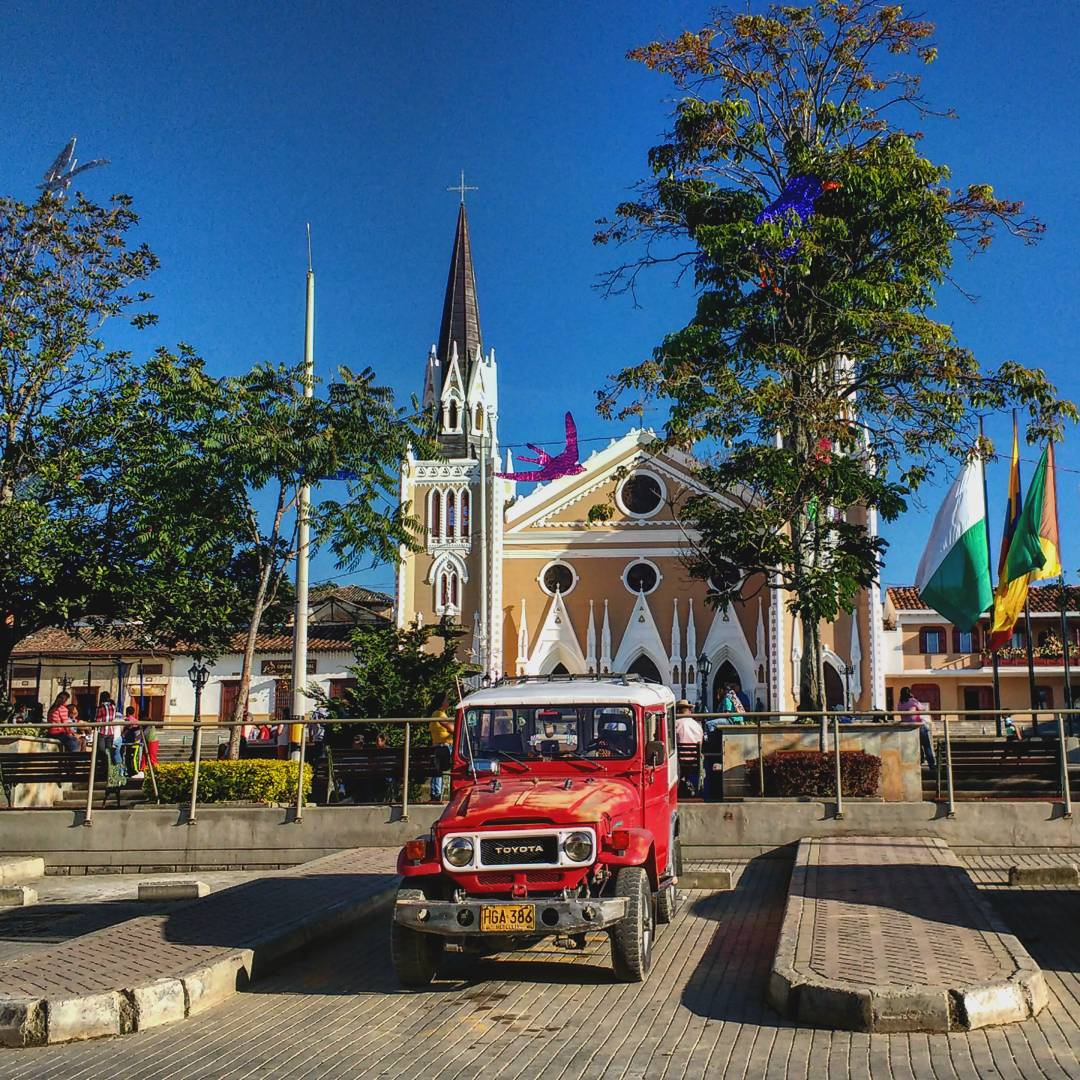 Parque de Abejorral